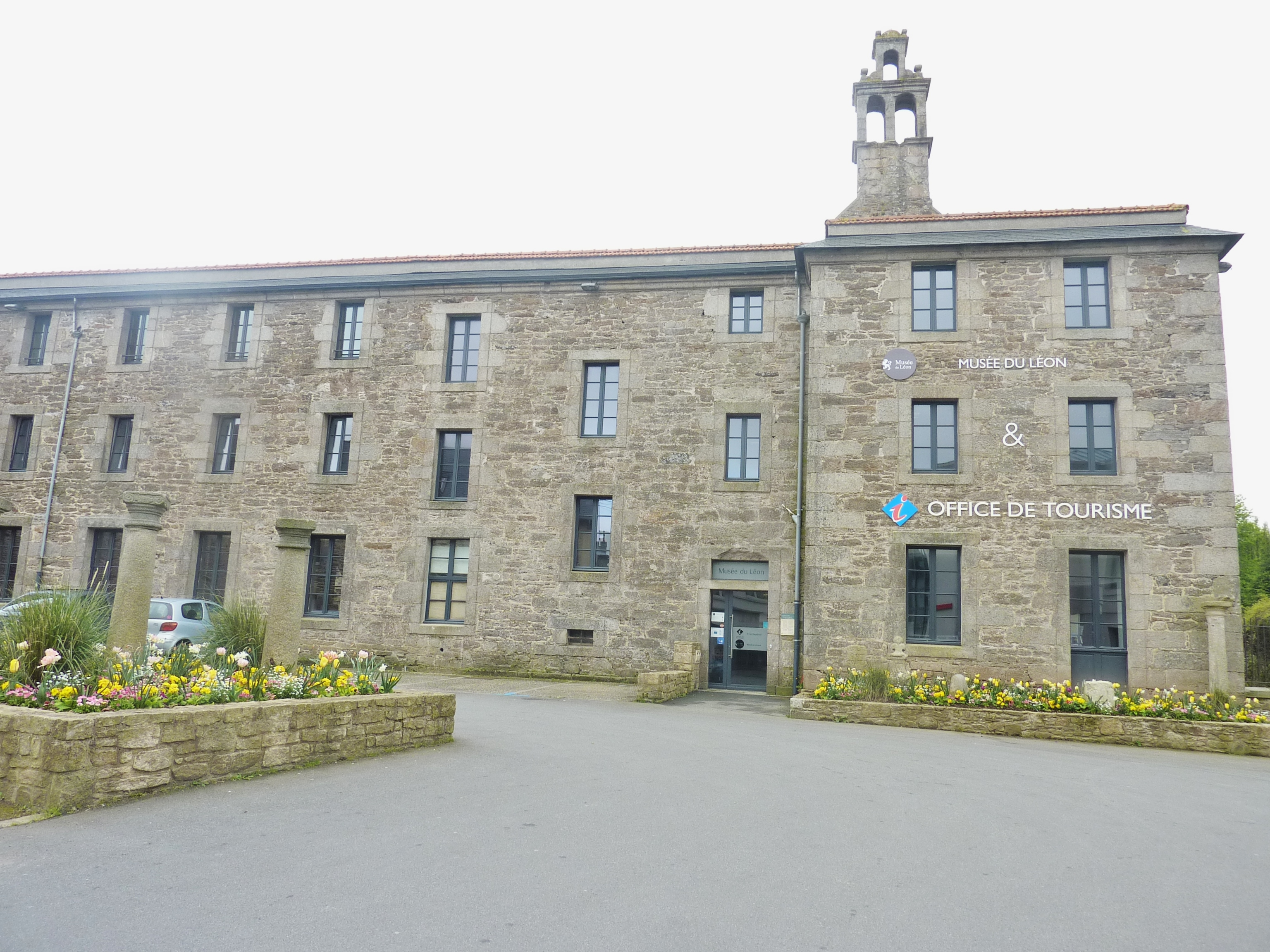 Lesneven : l'Office de tourisme et le musée du Léon (installés dans l'ancien couvent des Ursulines construit entre 1715 et 1748 dont on voit ici la façade avant). On voit à gauche de la photo, au premier plan, deux des trois piliers qui ornent la "Place des trois piliers", qui proviennent d'une ancienne auberge qui se trouvait non loin de là.